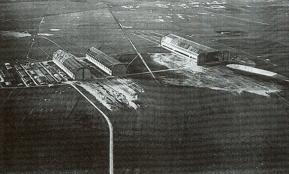 Tobias (Marine), Toni (Joachim) og Toska